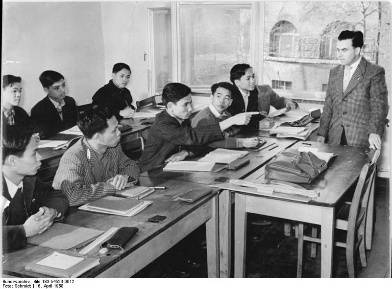 Leipzig, Unterricht für vietnamesische Studenten Zentralbild Schmidt 16.4.1958 Vietnamesische Studenten studieren in der Deutschen Demokratischen Republik. Das Kulturabkommen, das zwischen der Deutschen Demokratischen Republik und der Demokratischen Republik Vietnam abgeschlossen wurde, ermöglicht 18 Söhnen und Töchtern vietnamesischer Arbeiter und Bauern, in der DDR zu studieren. Sie sind im Internat des Instituts für Ausländerstudium in Leipzig untergebracht und lernen zunächst die deutsche Sprache, um sich dann im Studium in Chemie, Mathematik, Physik, Biologie, Gesellschaftswissenschaft und Sport Fachwissen anzueignen. UBz: Eine Diskussion während des Unterrichts.